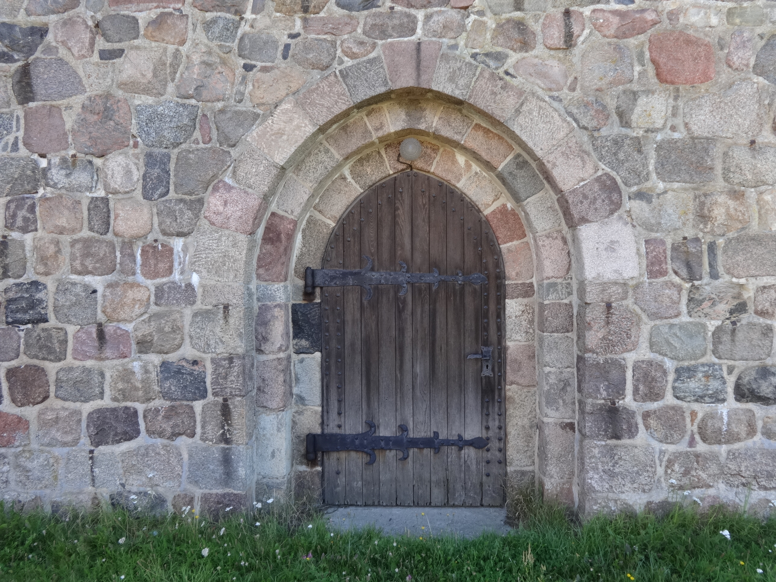 Die Dorfkirche in Haßleben ist eine Saalkirche aus der ersten Hälfte des 13. Jahrhunderts und einer Südvorhalle aus dem Jahr 1887. Im Innern befinden sich eine neugotische Kanzel aus dem Jahr 1887 sowie eine Orgel von Friedrich Hermann Lütkemüller von 1863.